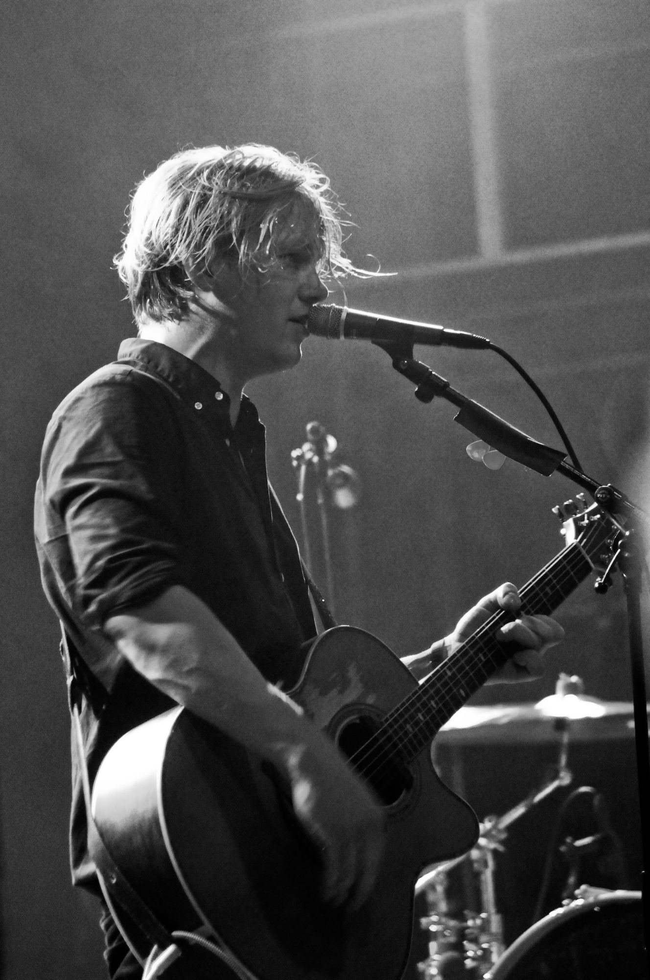 John Engelbert in Johnossi 2008